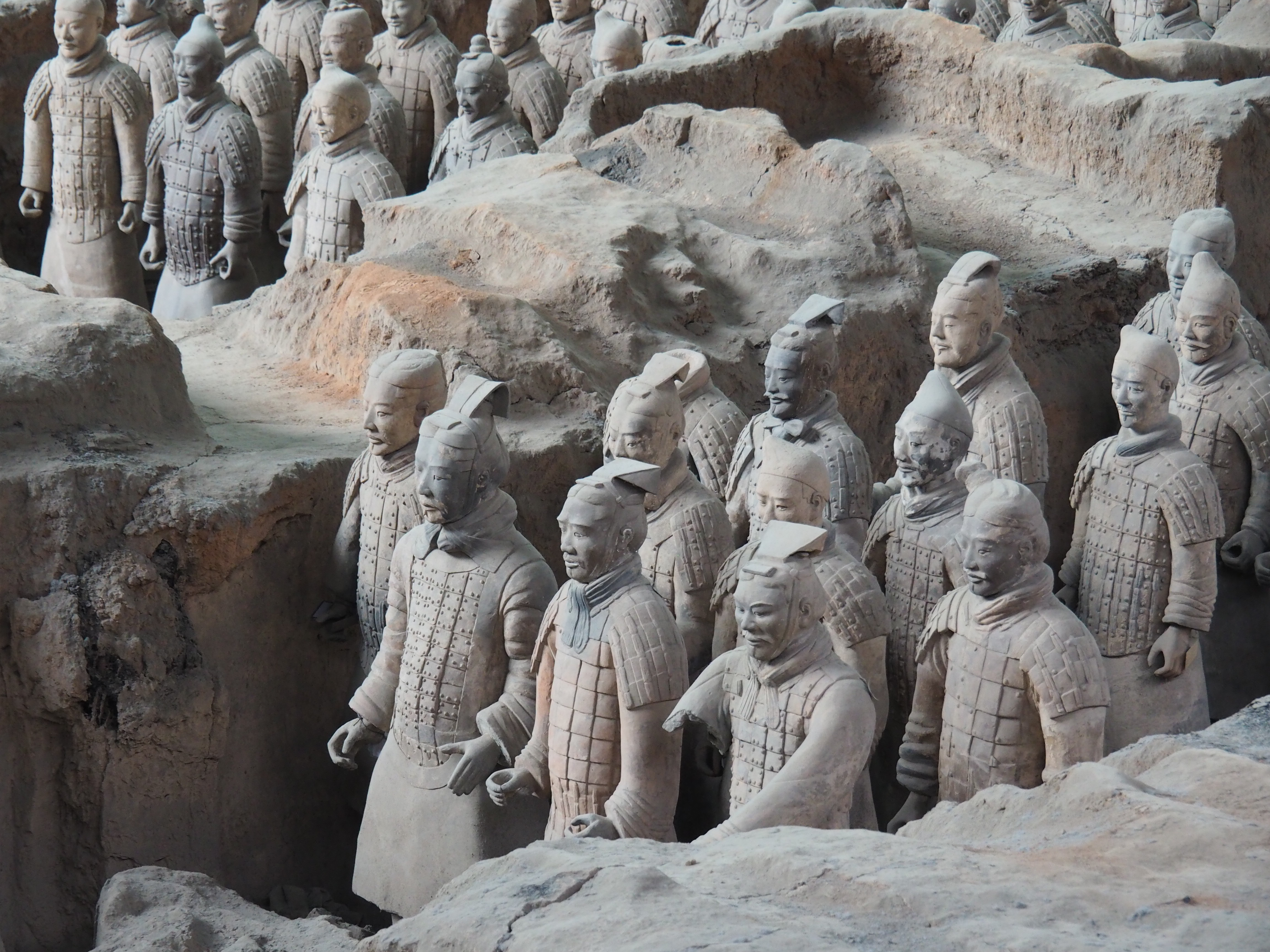 Terracotta Warriors